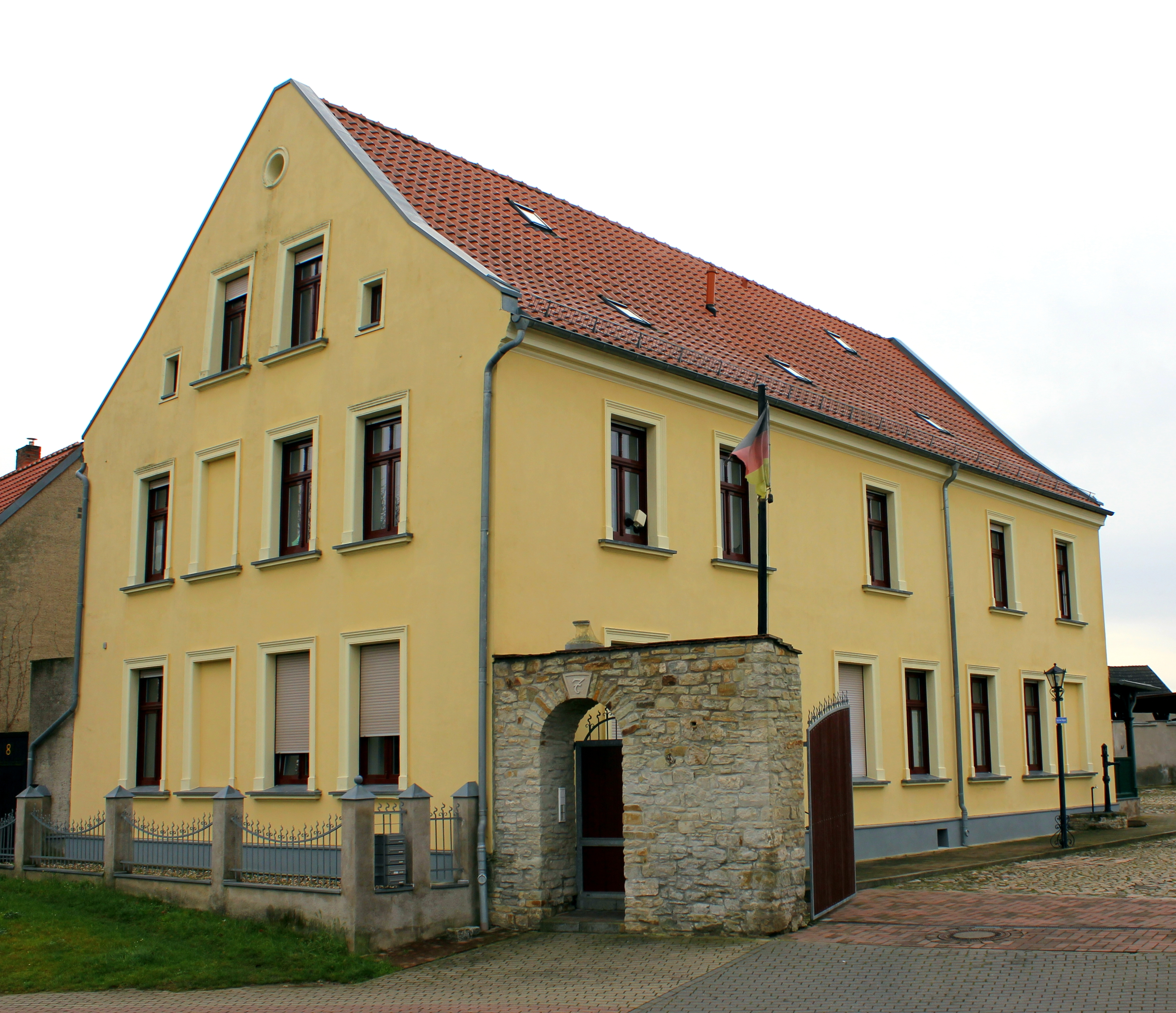 Bauernhof Alte Kirchstraße 7 Osterweddingen